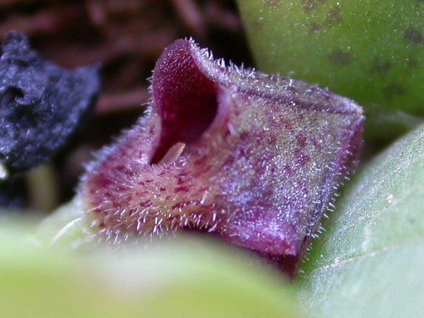 Photos by Americo Docha neto & Dalton Holland Baptista first published in Orchidstudium.